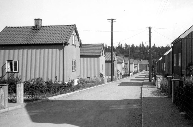 Öbackavägen söderut från Skällnoravägen i Nockebyhovs småstugeområde